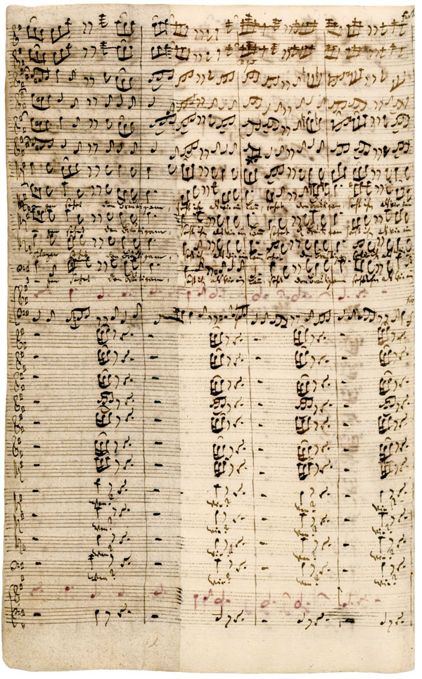 Autographseite Matthäuspassion; in der Mitte, rot notiert und ohne Textunterlegung, die Choralzeile "...am Stamm des Kreuzes geschlachtet"